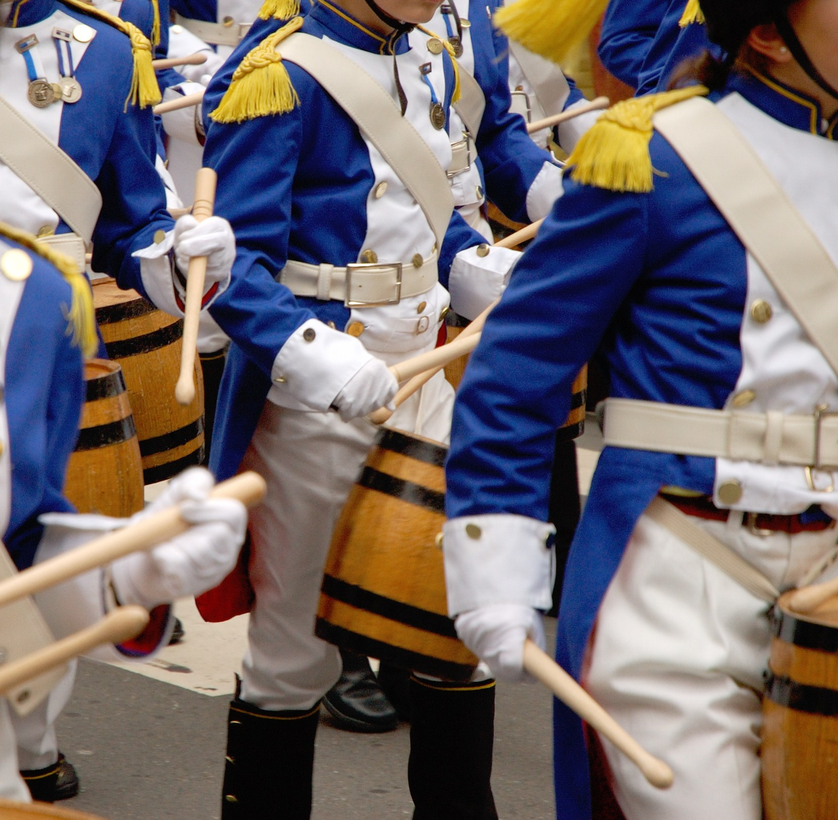 Imagen de una compañía de la Tamborrada infantil de San Sebastián (Guipúzcoa, España)